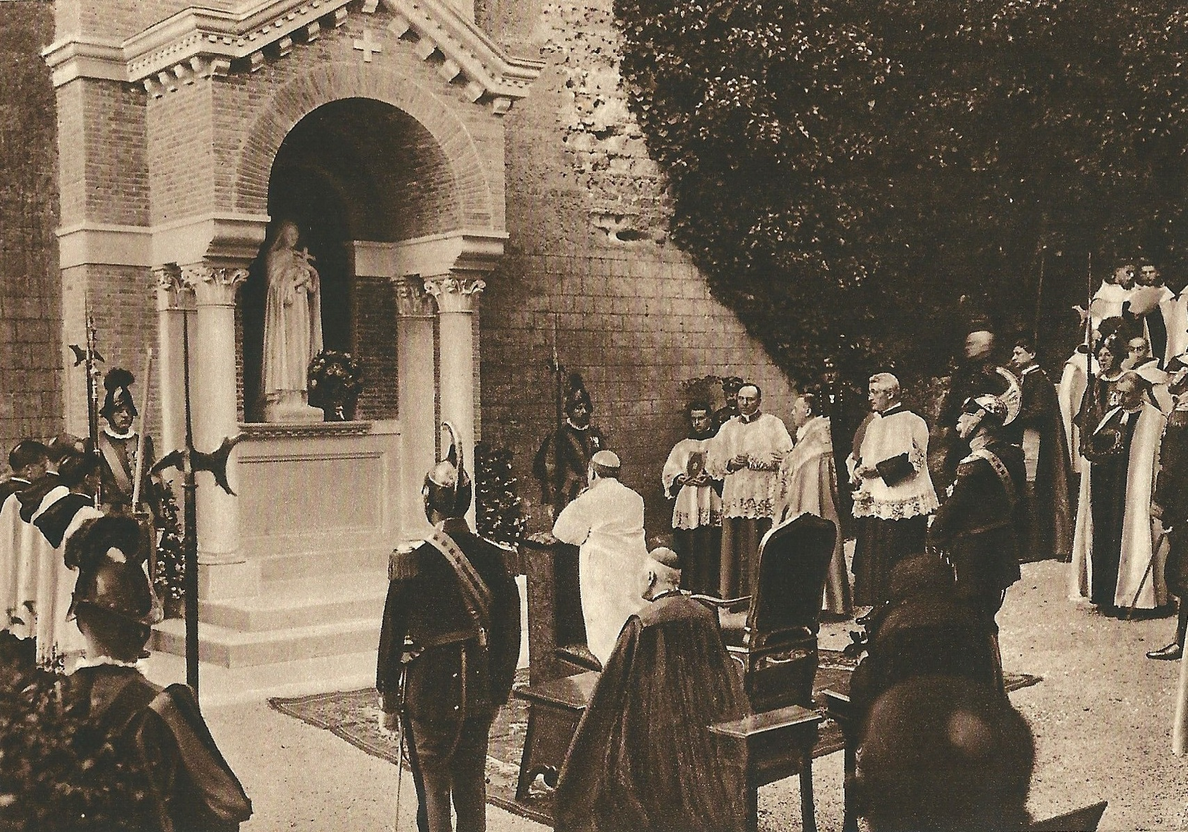 Gravure de "Sainte Thérèse de l'Enfant Jésus, Histoire d'une âme écrite par elle-même, Lisieux, Office central de Lisieux (Calvados), & Bar-le-Duc, Imprimerie Saint-Paul, 1937, édition 1940." Le pape Pie XI en prière devant la statue de sainte Thérèse, inaugurée dans les jardins du Vatican, le 17 mai 1927.